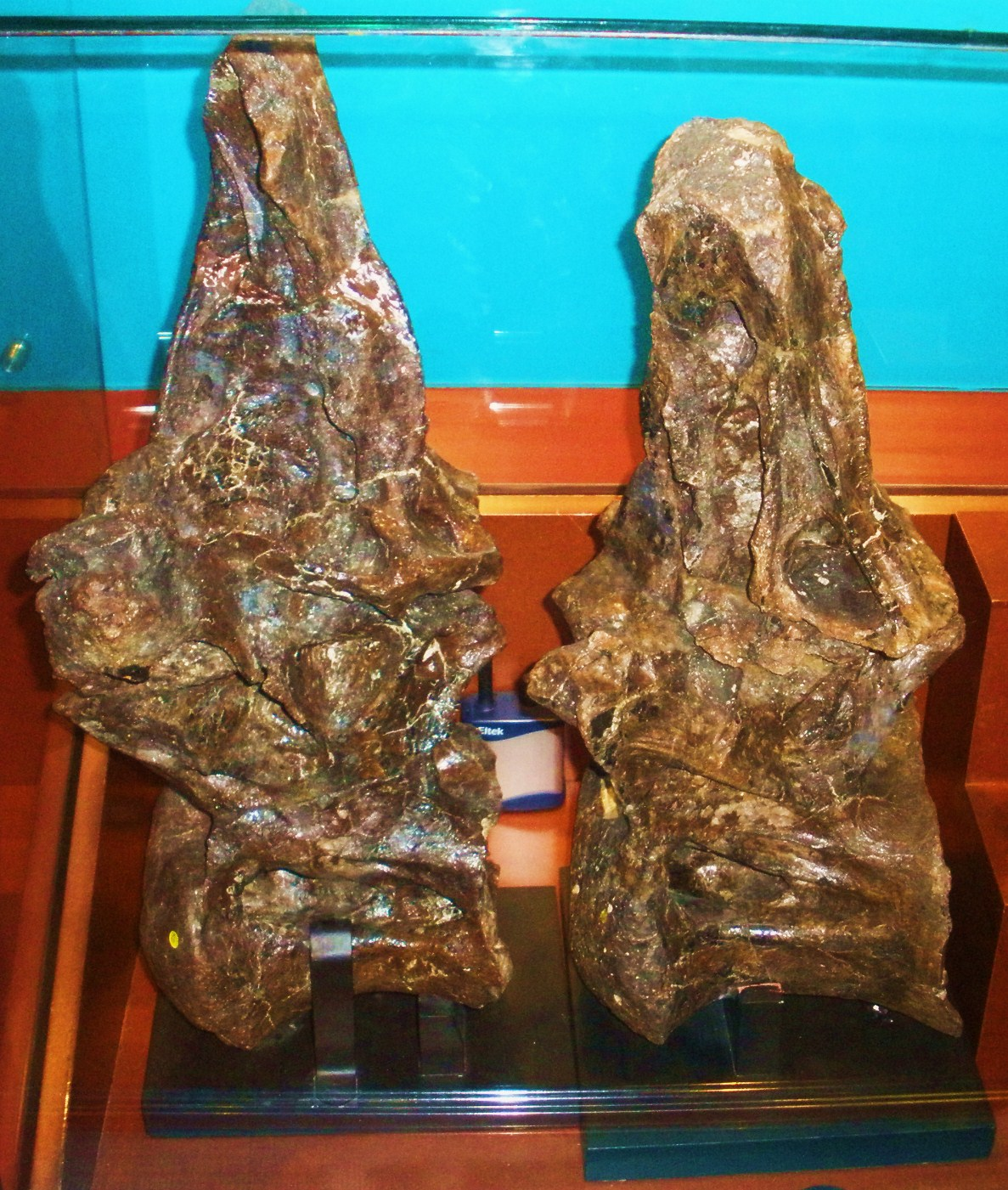 Fossil vertebrae referred to the dinosaurs Ornithopsis or Eucamerotus. Took the photo at Natural History Museum, London